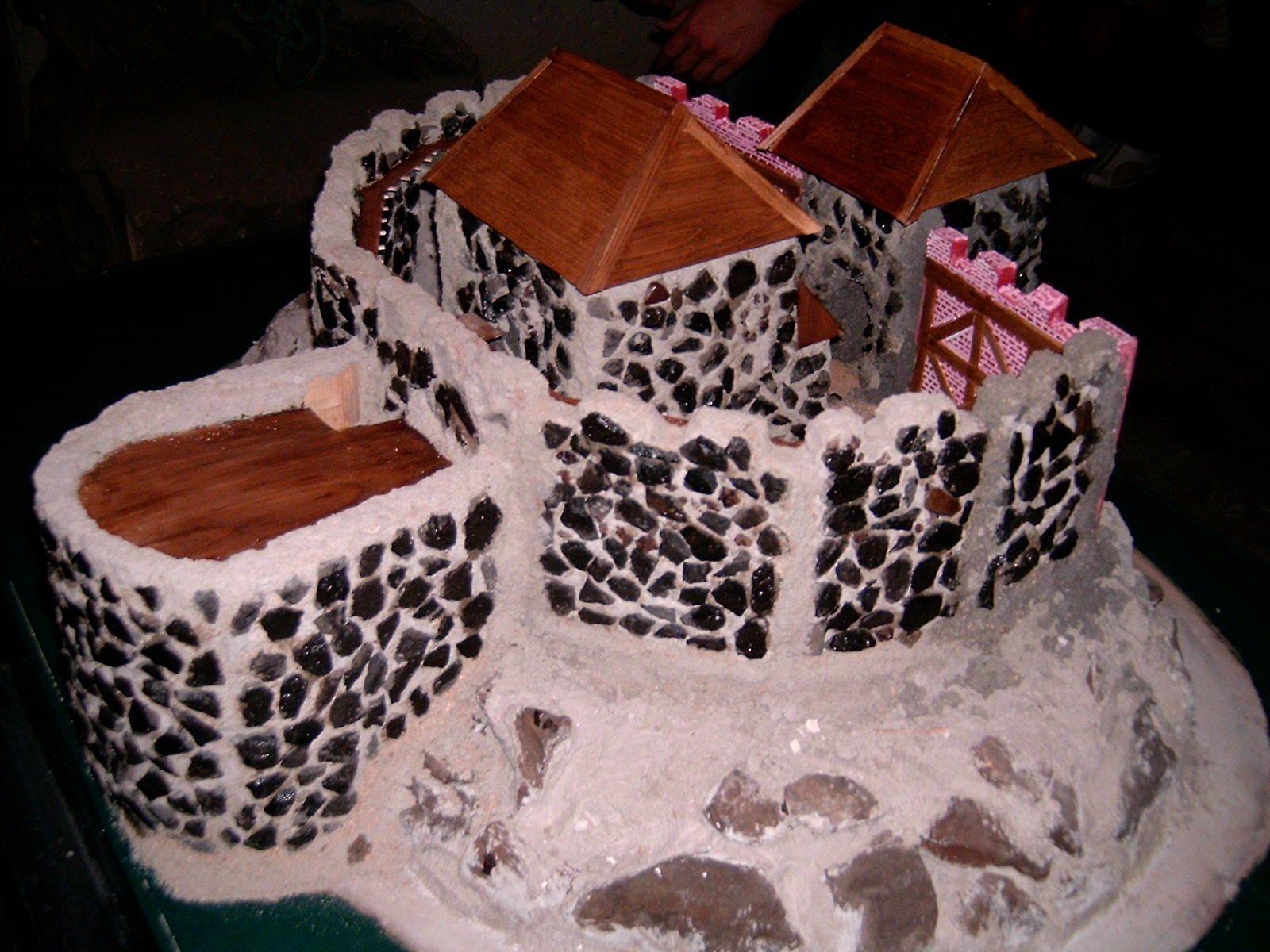 Próba rekonstrukcji zamku w Szprotawie aut. K.Wachowiaka